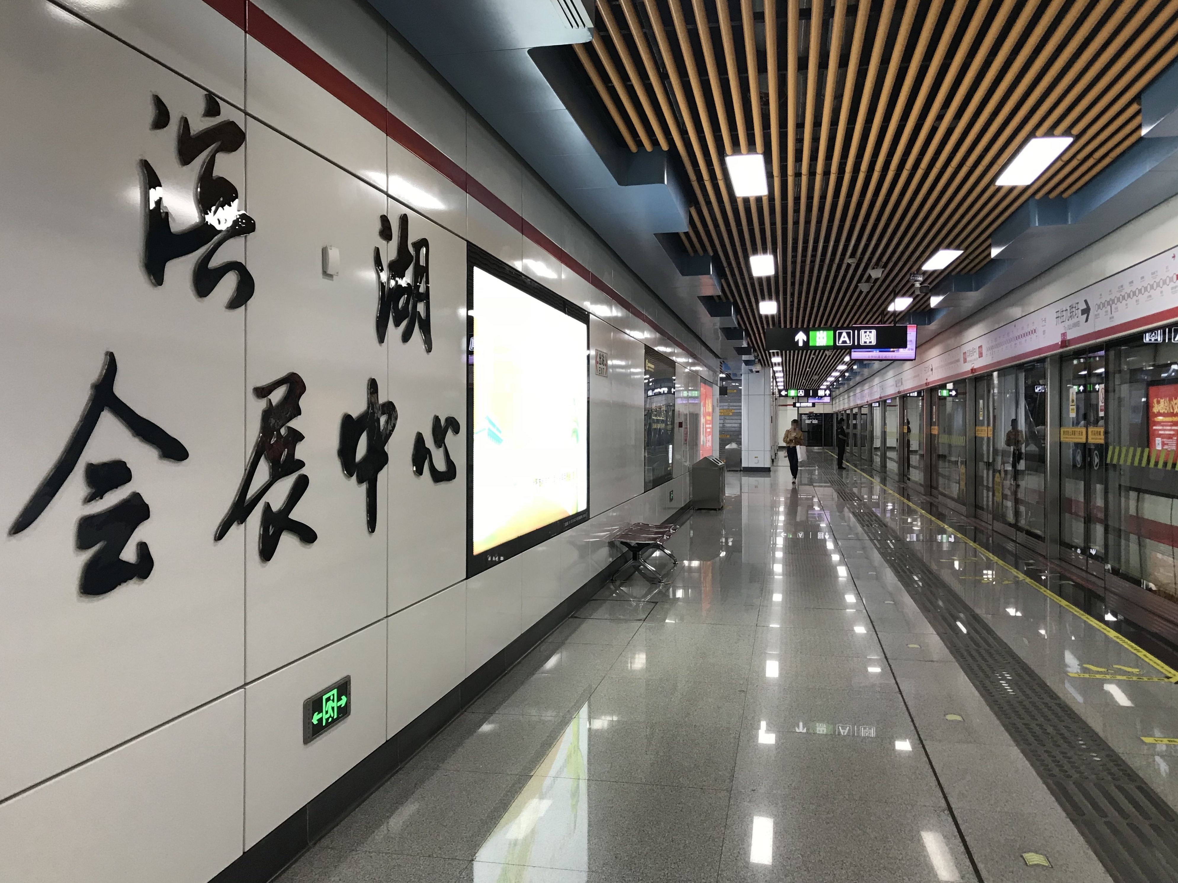 浜湖会展センター駅のホーム